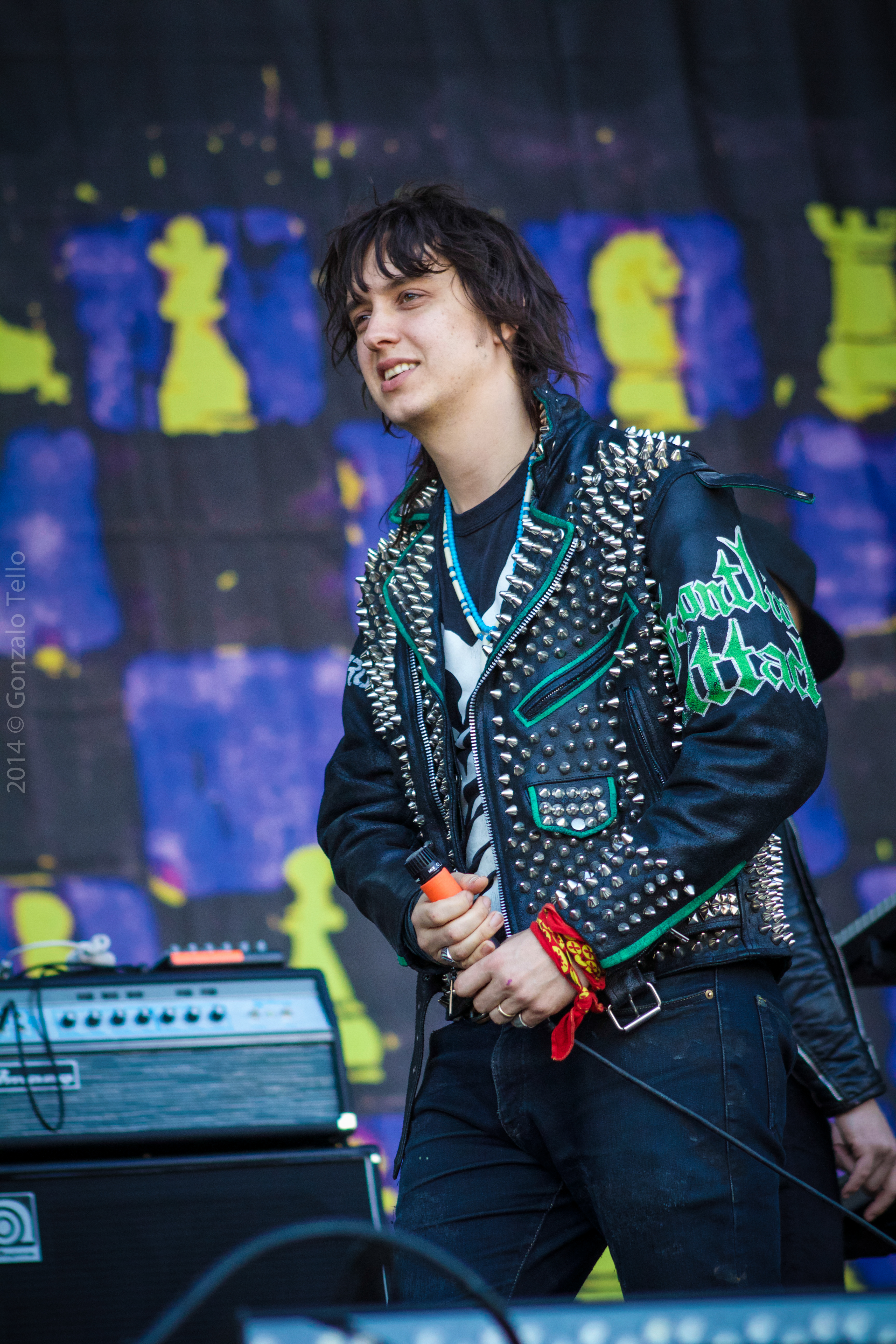 Foto: Gonzalo Tello